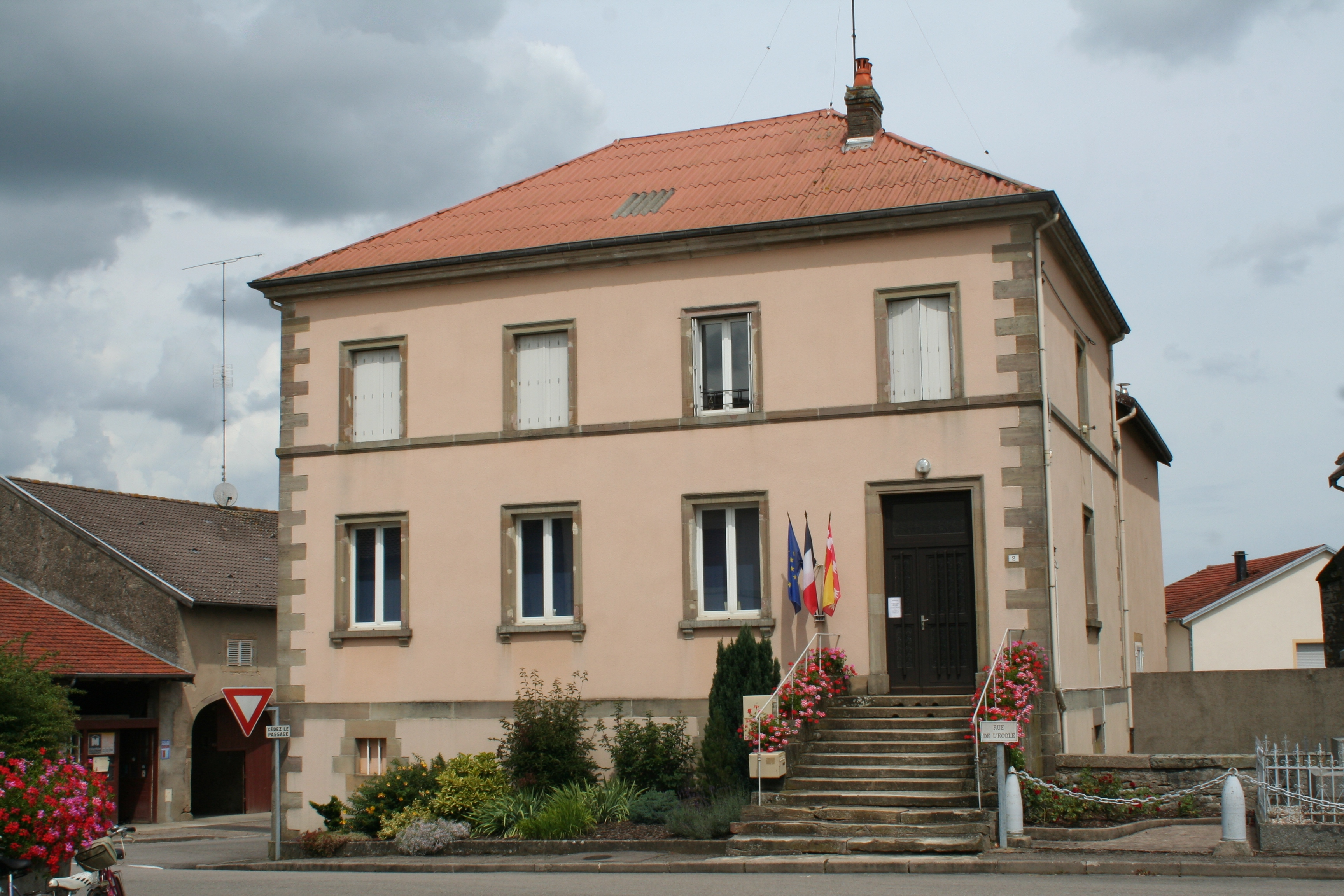 Mairie-école de Saint-Maurice-sur-Mortagne (Vosges)